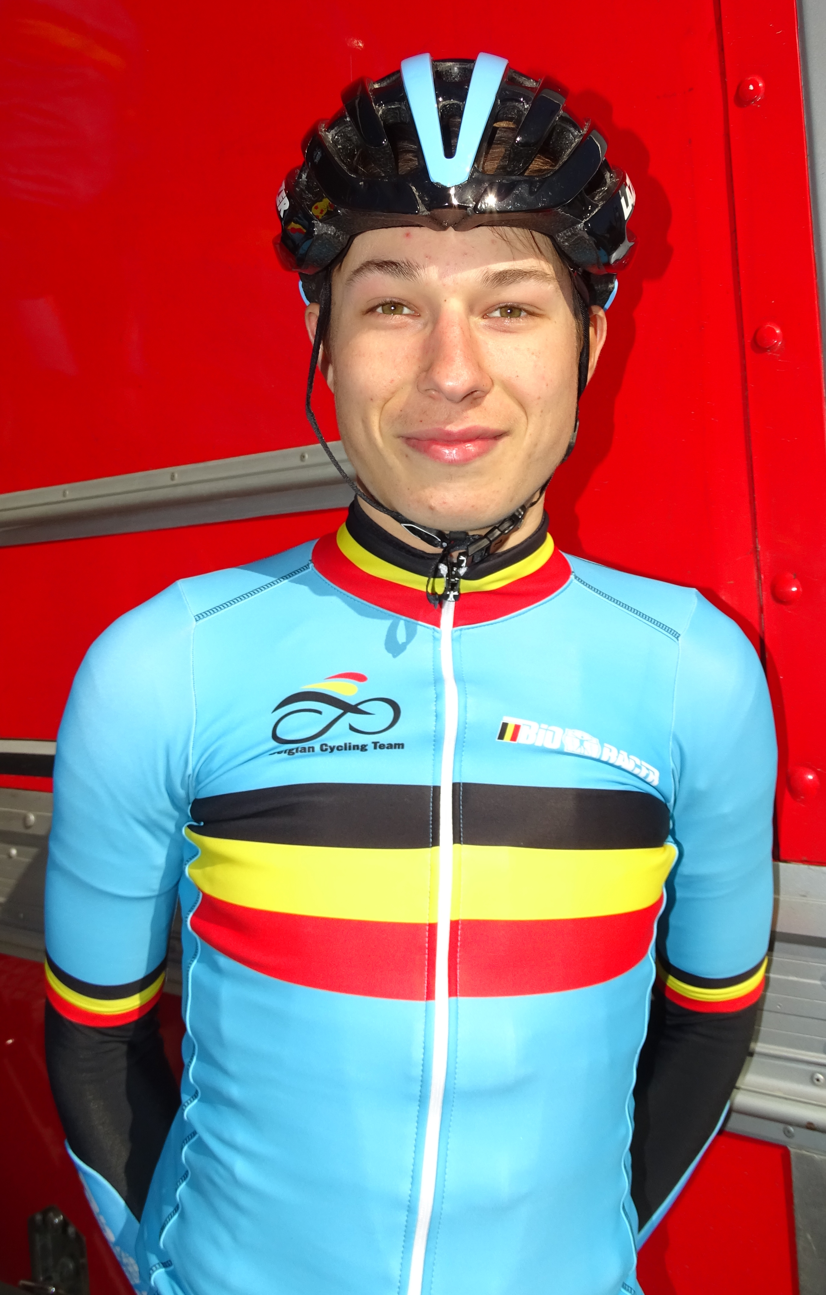 Reportage réalisé le dimanche 10 avril à l'occasion du départ du Paris-Roubaix juniors 2016 à Saint-Amand-les-Eaux, France.